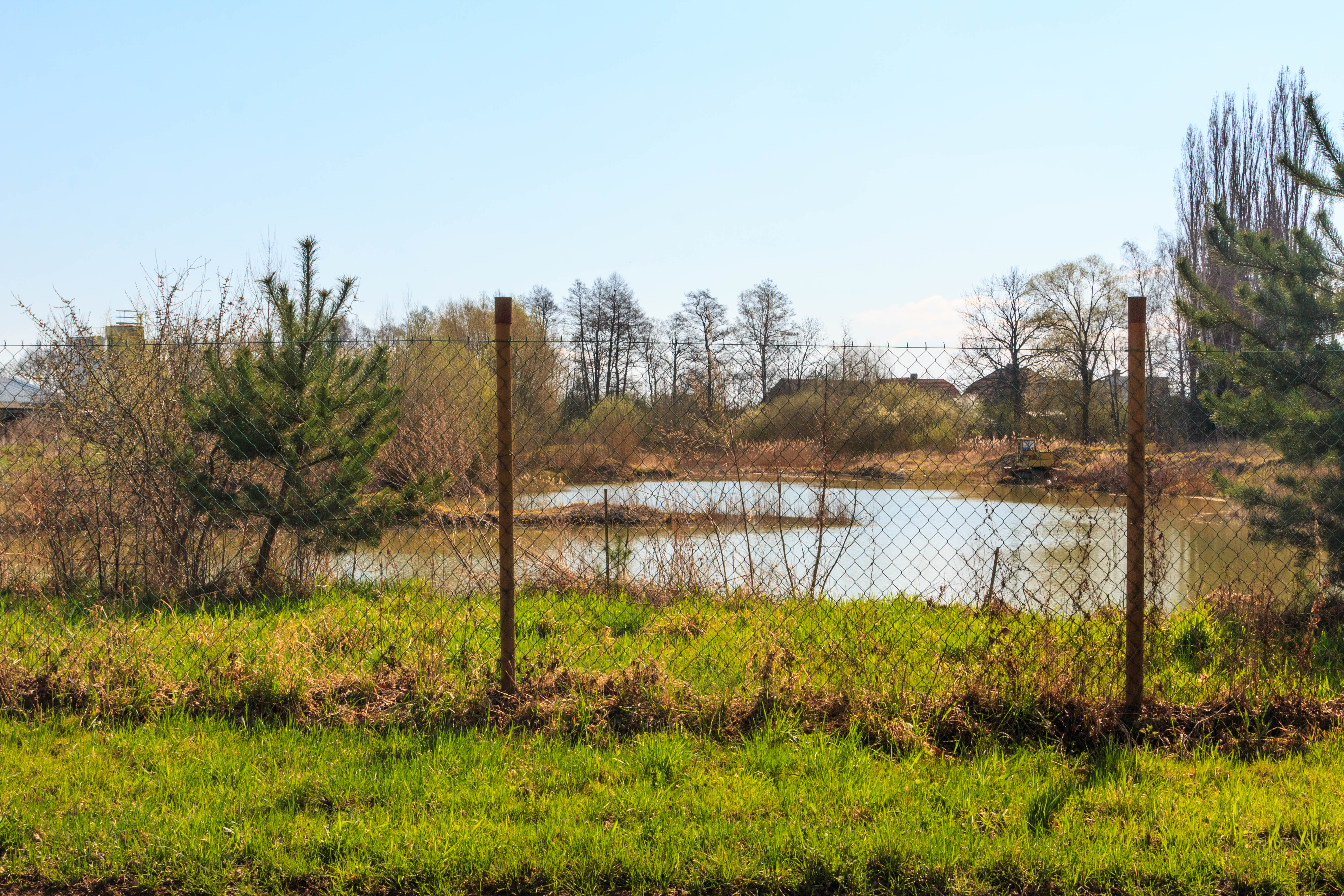 Písníky u Lhoty pod Přeloučí Project: Vodstvo.